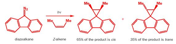 trabalho carbenos química orgânica avançada